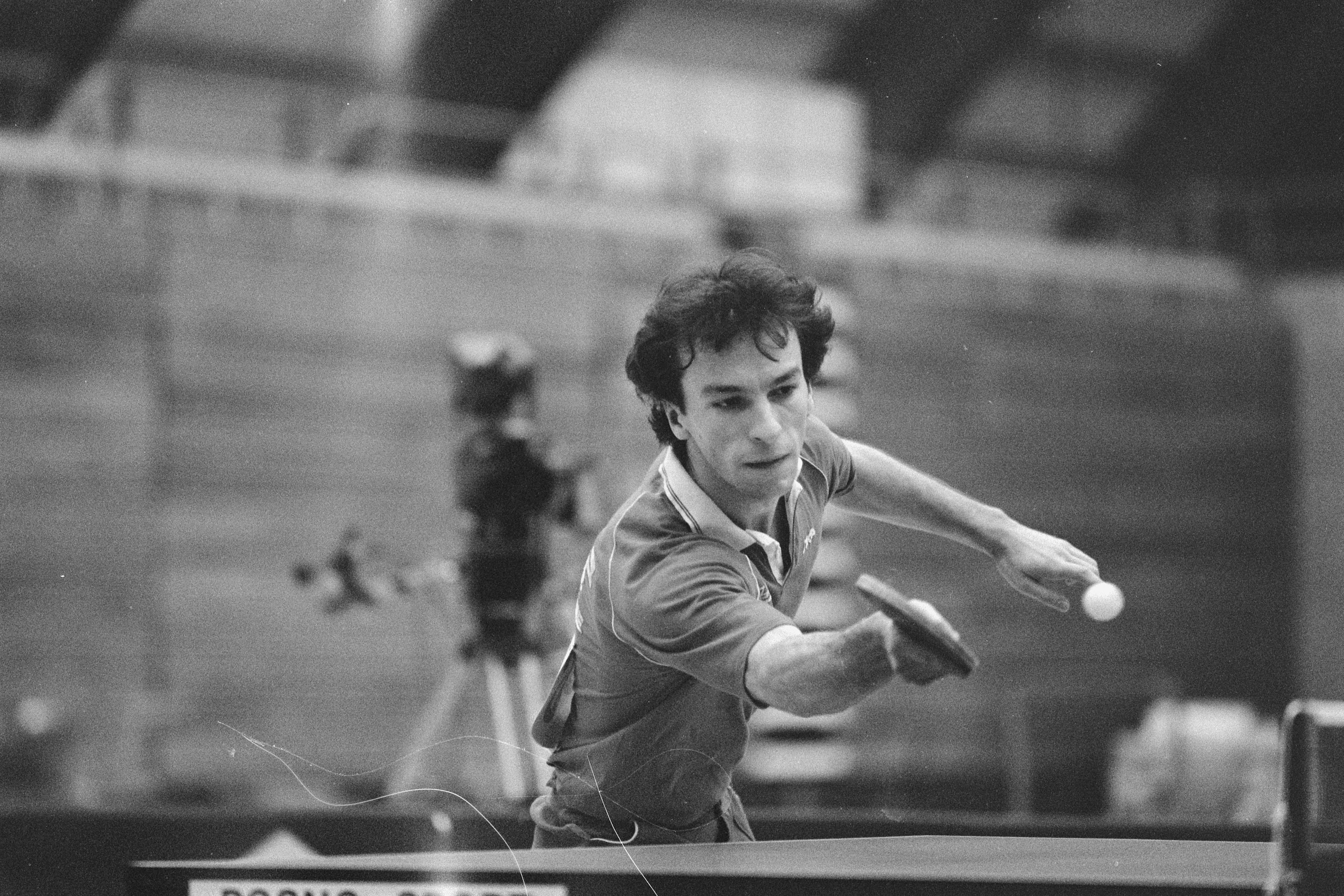 Collectie / Archief : Fotocollectie Anefo Reportage / Serie : [ onbekend ] Beschrijving : NK tafeltennis in Amsterdam; Paul Haldan in actie Datum : 21 december 1986 Locatie : Amsterdam, Noord-Holland Trefwoorden : tafeltennis Persoonsnaam : Haldan, Paul Fotograaf : Croes, Rob C. / Anefo, [onbekend] Auteursrechthebbende : Nationaal Archief Materiaalsoort : Negatief (zwart/wit) Nummer archiefinventaris : bekijk toegang 2.24.01.05 Bestanddeelnummer : 933-8475